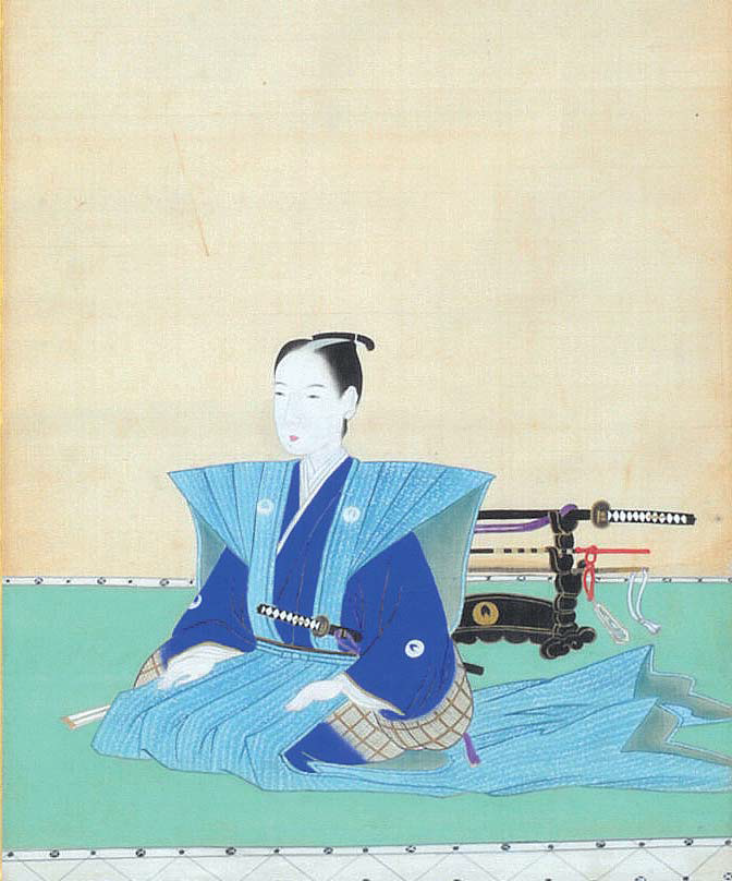 諫早武春の肖像。